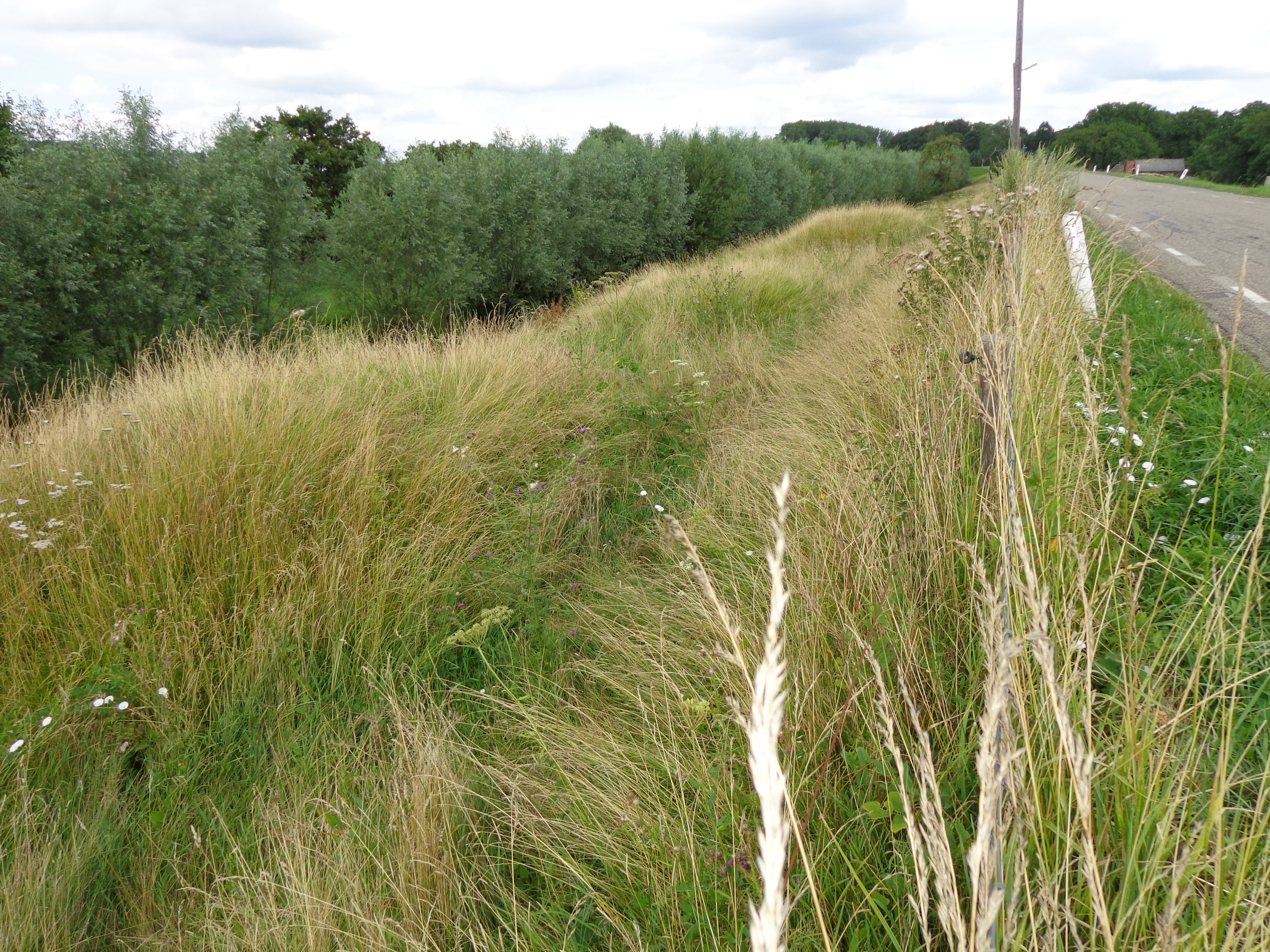 Drie gescutsbanken aan de Diefdijk bij Fort Everdingen